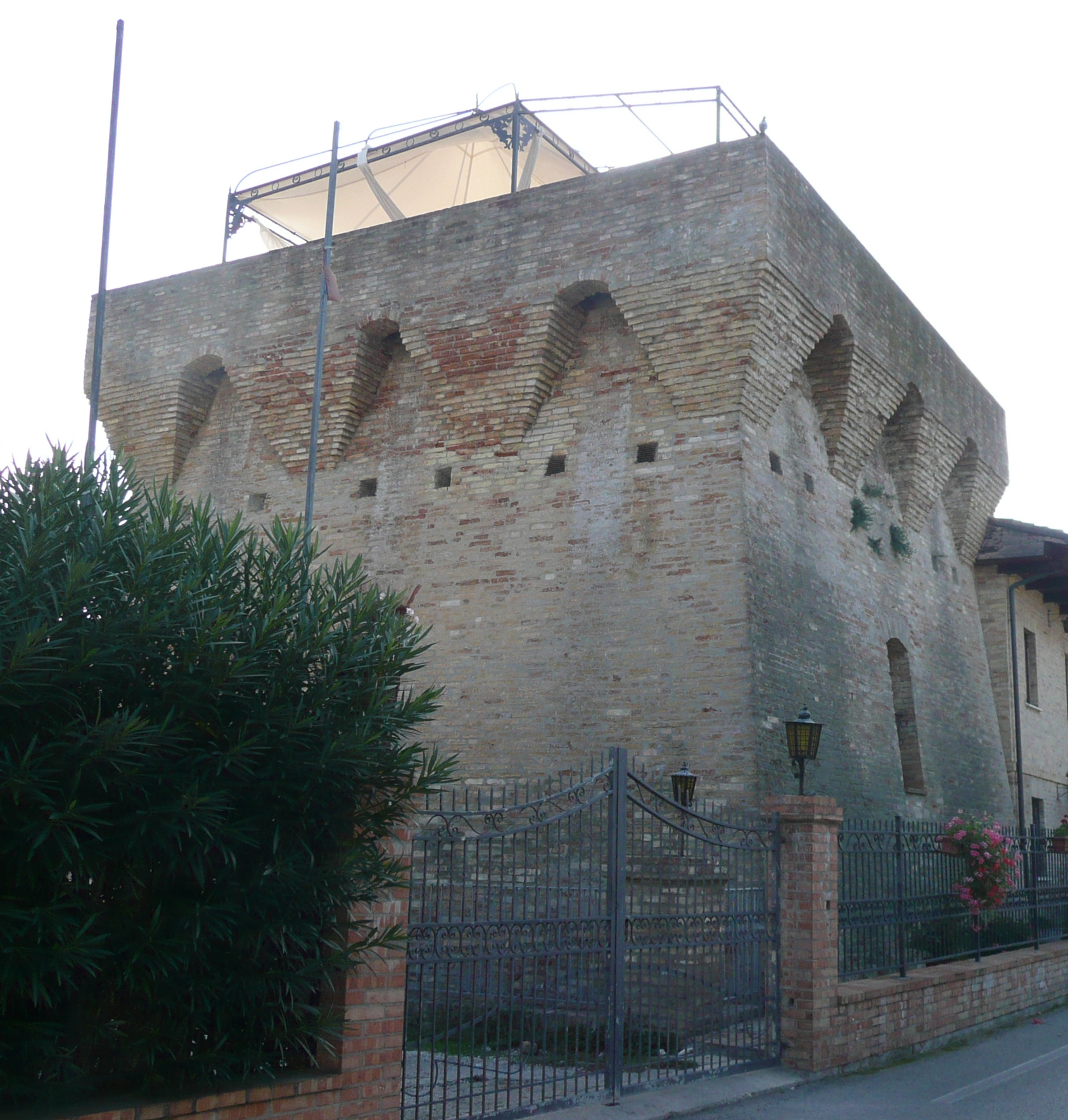 E' una delle Torri costiere del Regno di Napoli sopravvissute in Abruzzo, si trova ad Alba Adriatica (TE), nei pressi della foce del torrente Vibrata.